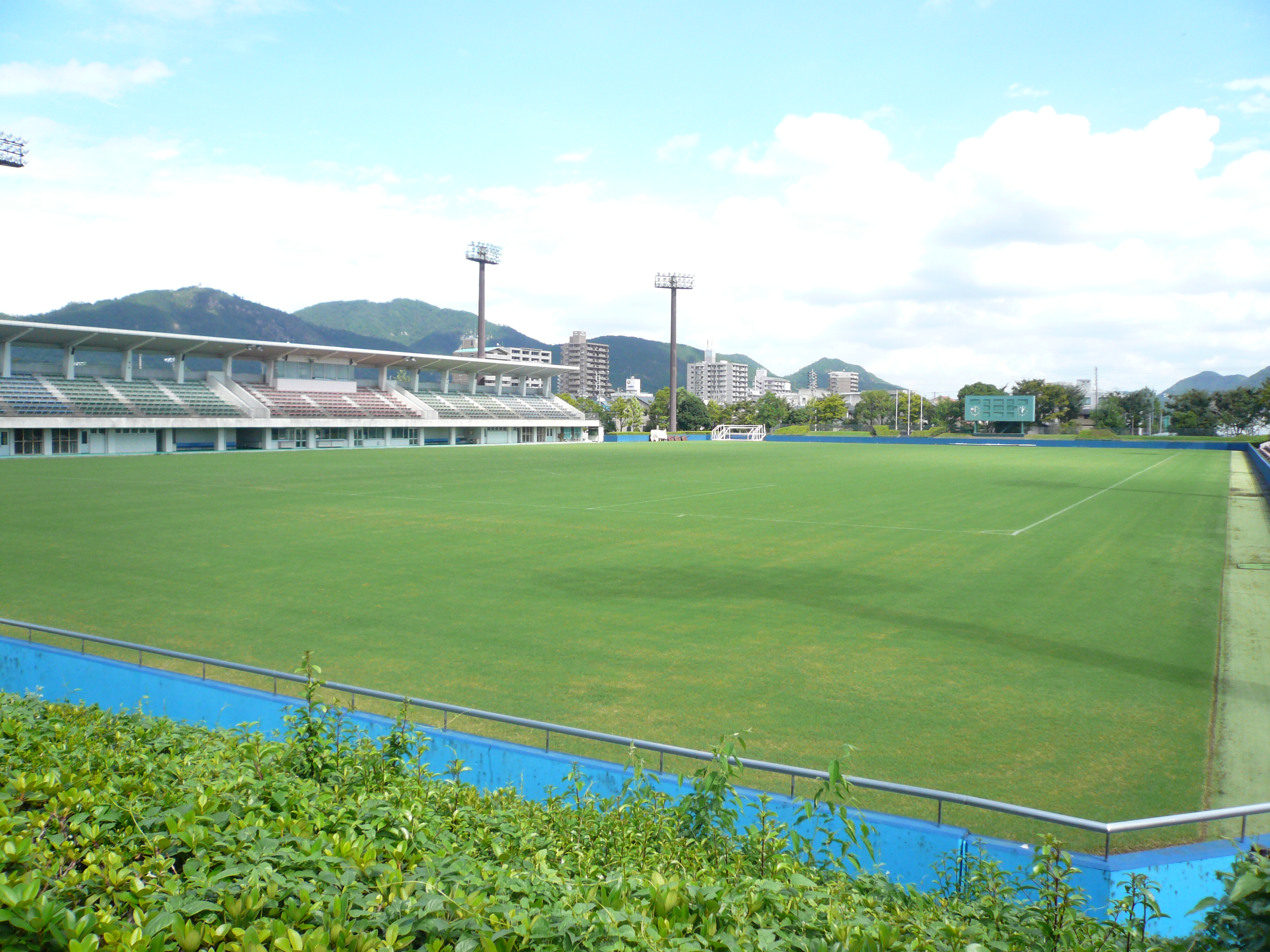 Nagaragawa Ball Field Meadow（長良川球技メドウ）,Gifu,Gifu(岐阜県岐阜市)で撮影。